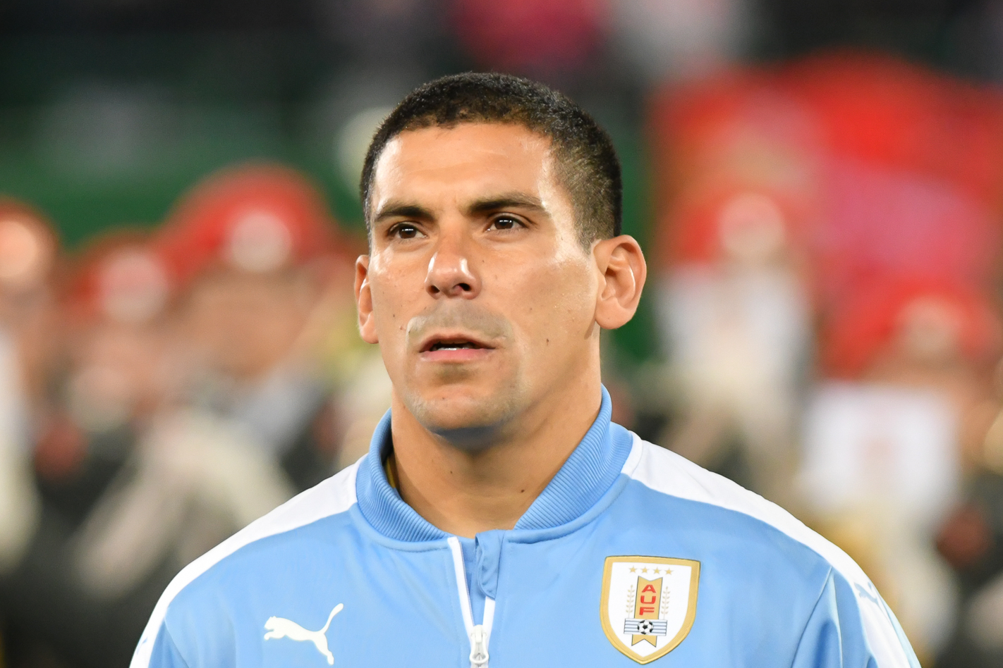 Wien, Österreich, 14.11.2017, Sport, Fussball, OEFB Freundschaftliches Laenderspiel - Österreich vs Uruguay. Bild zeigt Maxi Pereira (URU).